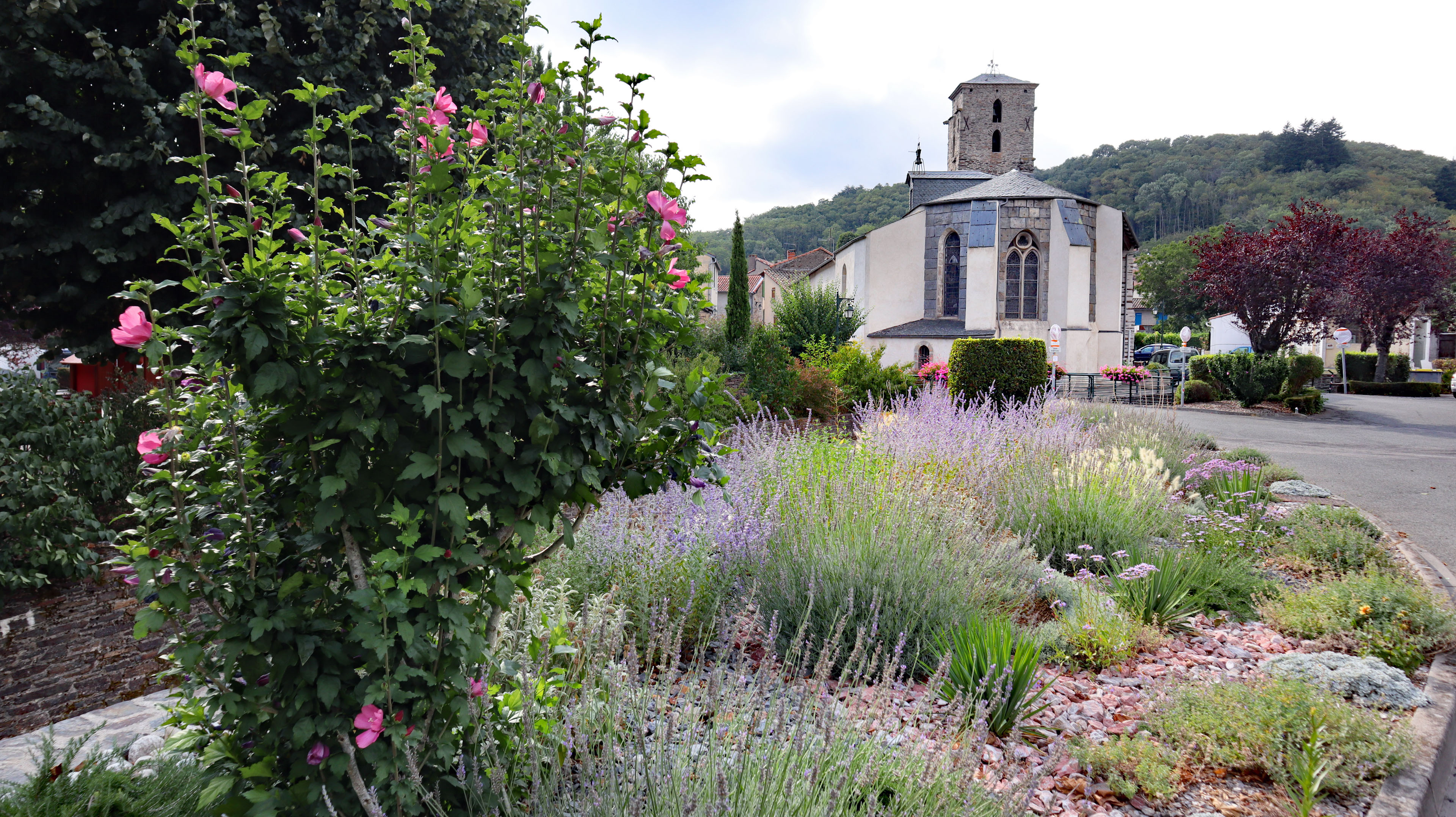 Fleurissement